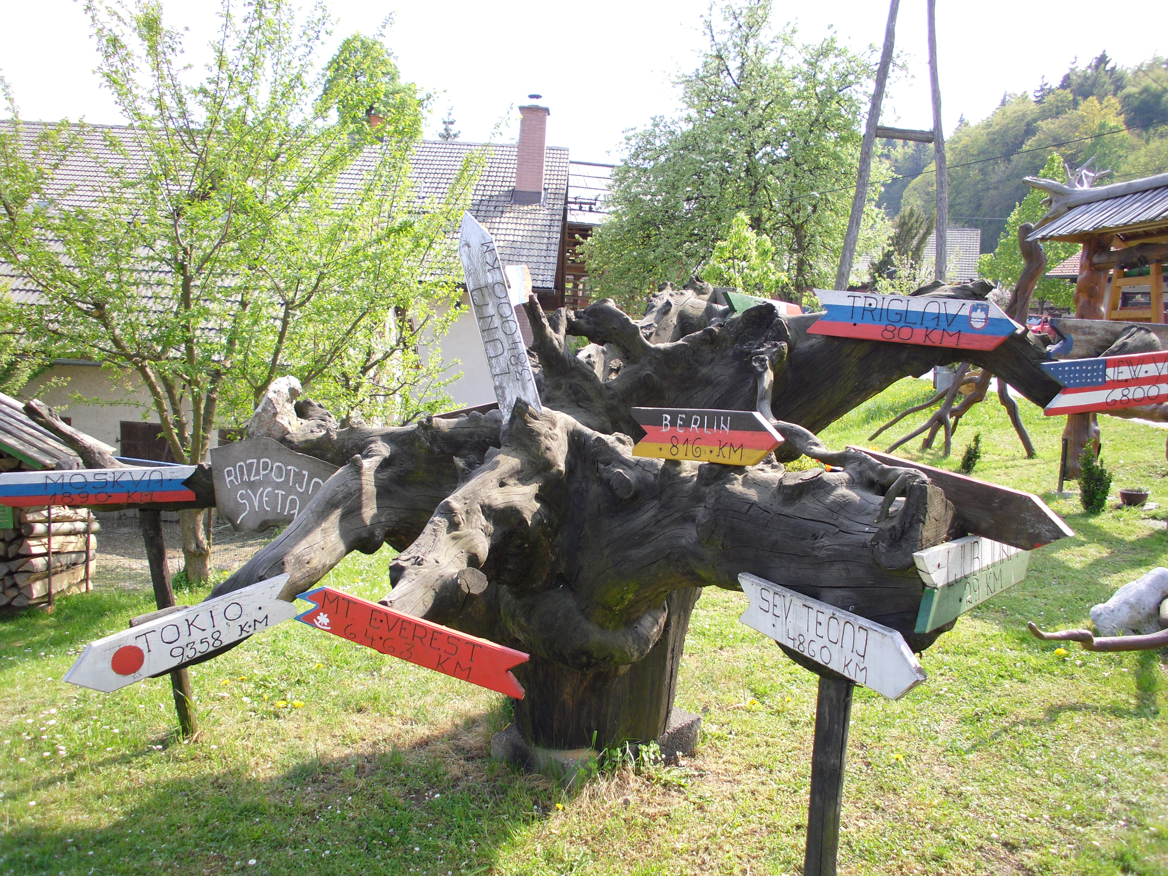 GEOSS Svetovni smerokaz